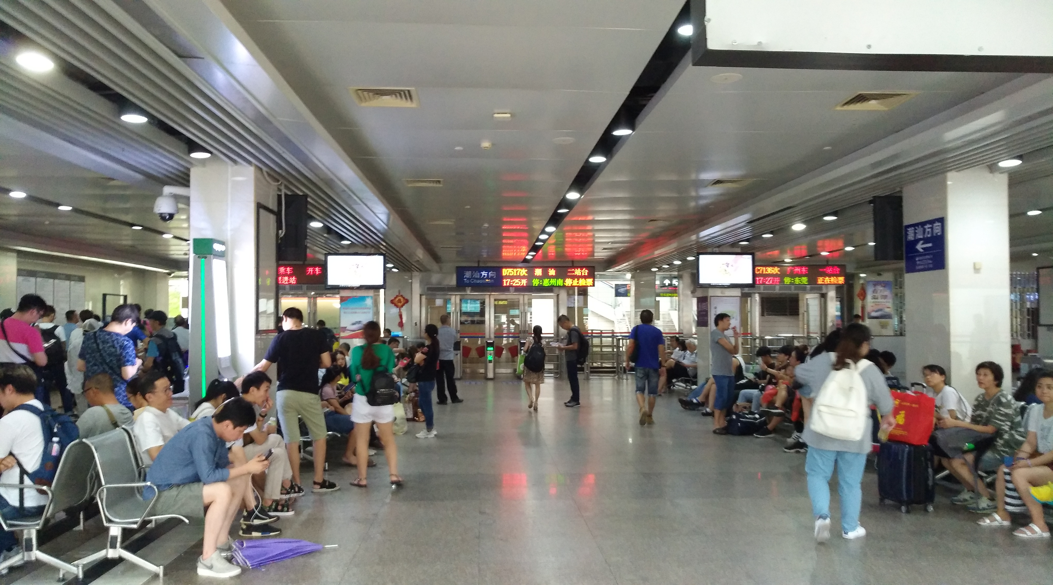 中国铁路 常平站 非跨境线候车室